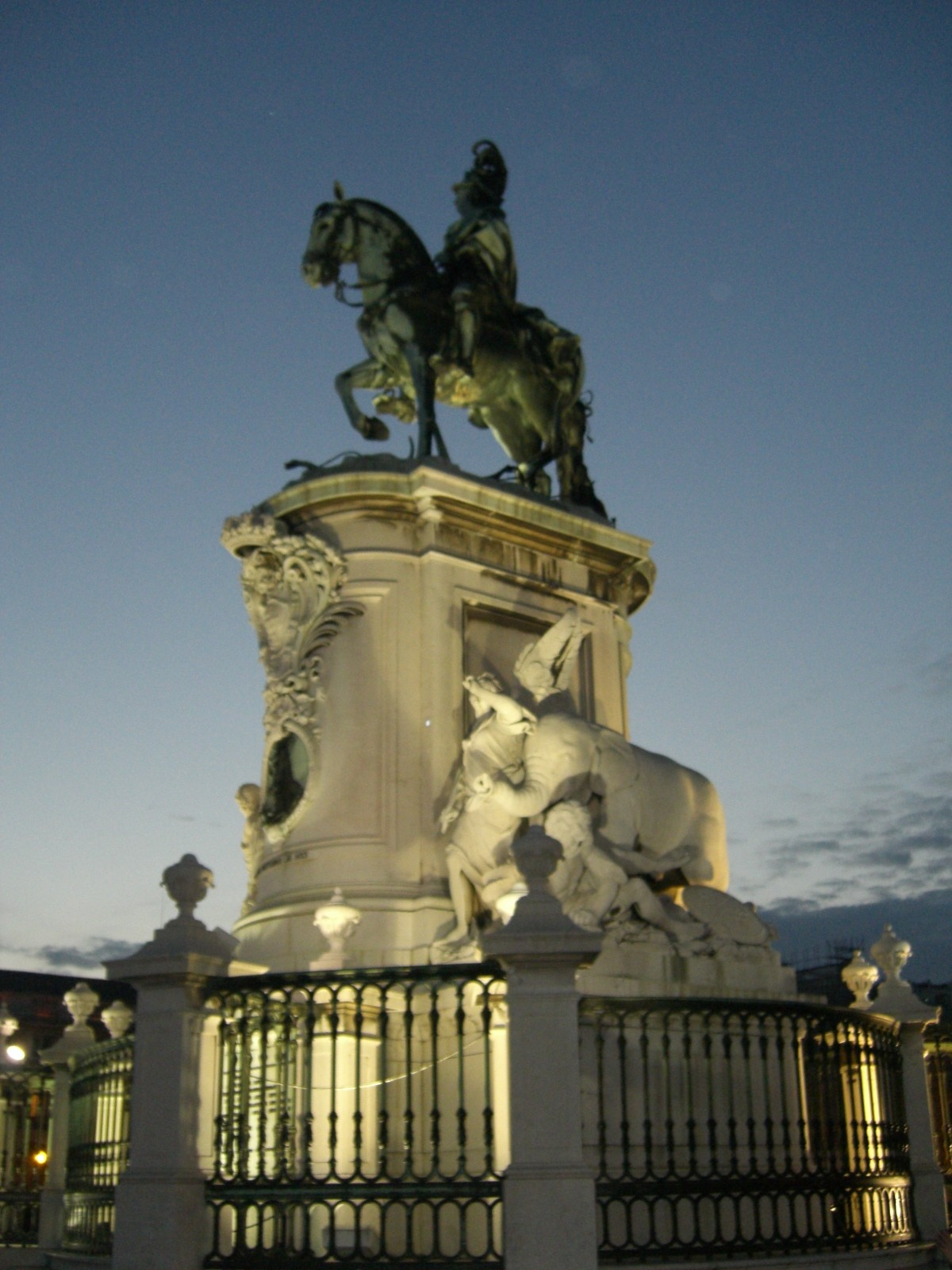 Estátua de D. José na Praça do Comércio em Lisboa, Portugal Fonte - Próprio autor